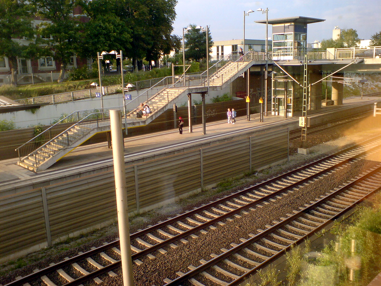 Eindrücke vom denkmalgeschützten Alten Bahnhof Anderten in Hannover ...